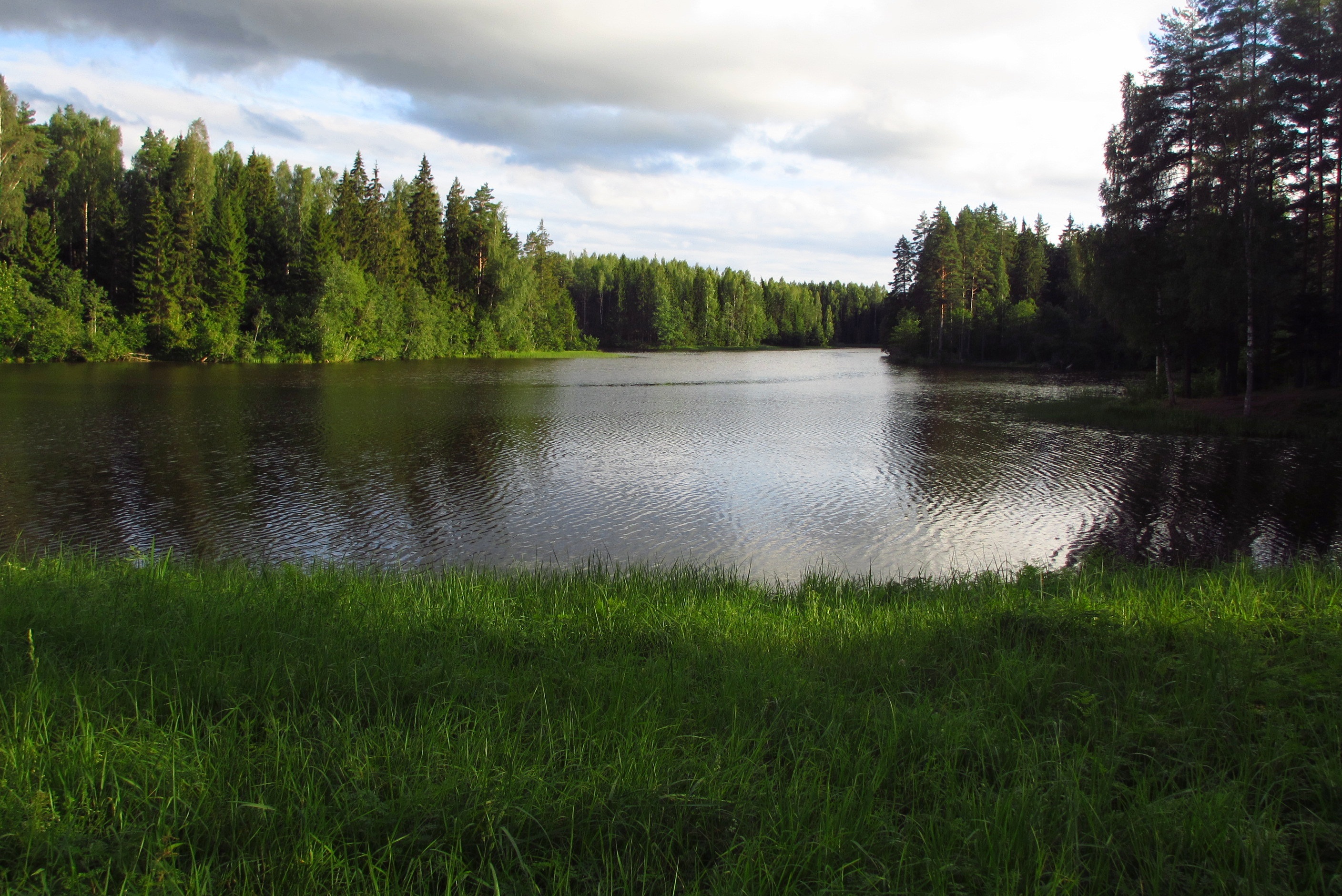 Vaade Rae järve põhjakaldalt Pärnumaal